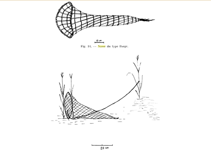 Nasses utilisées au Cameroun